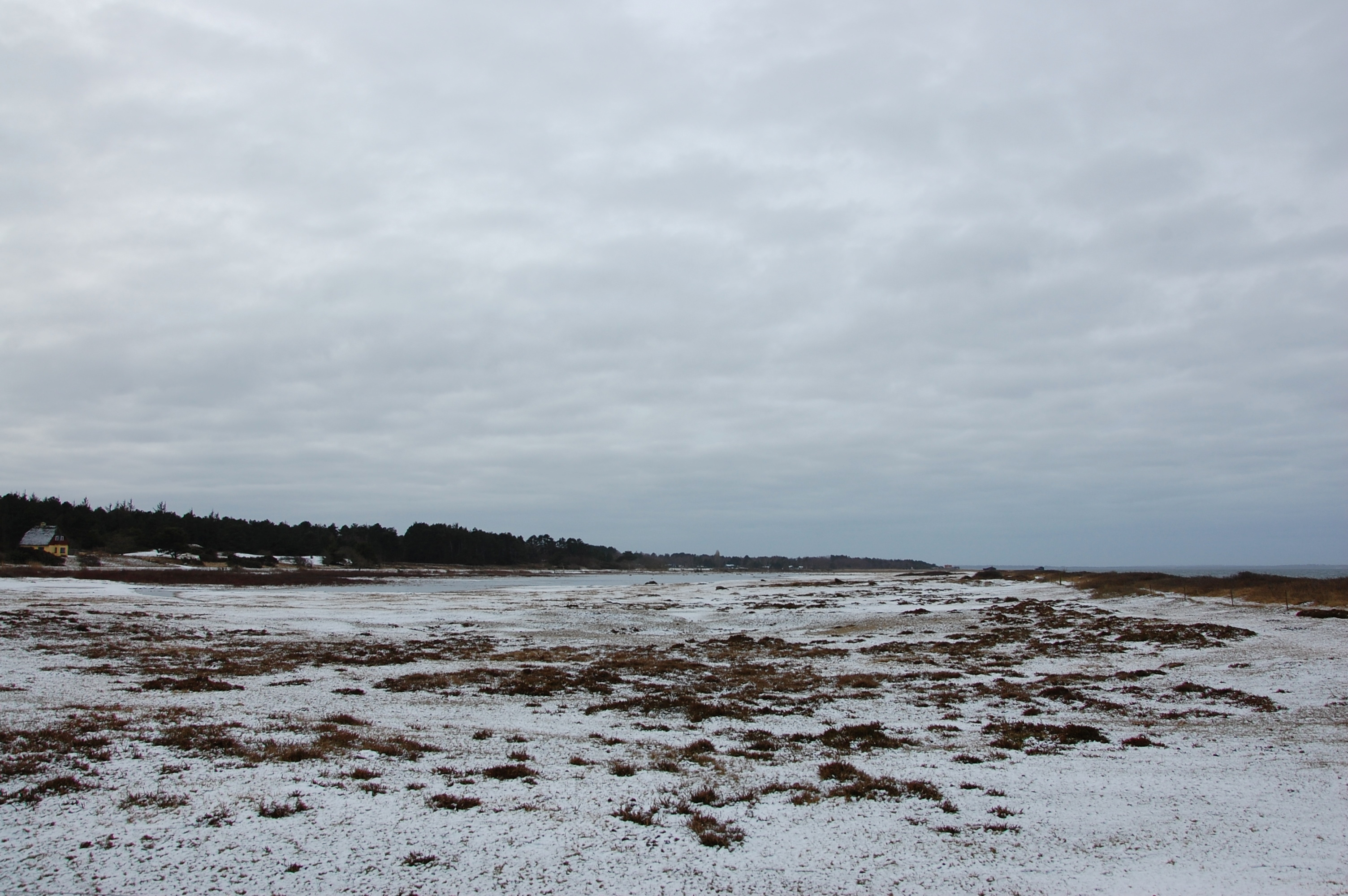 Korshage Winterlandschaft Blick nach Westen